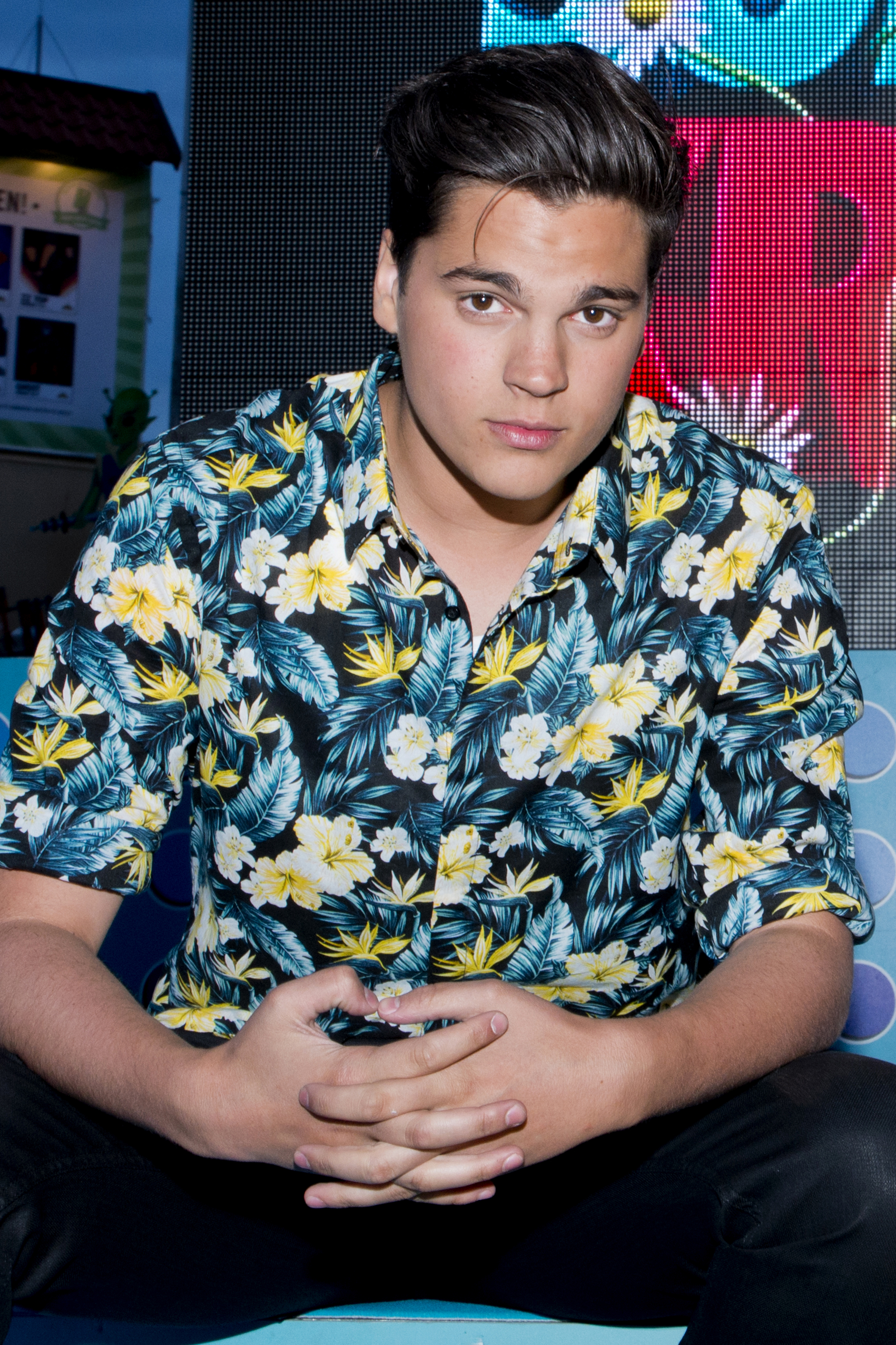 Oscar Zia (Cropped version) på Sommarkrysset